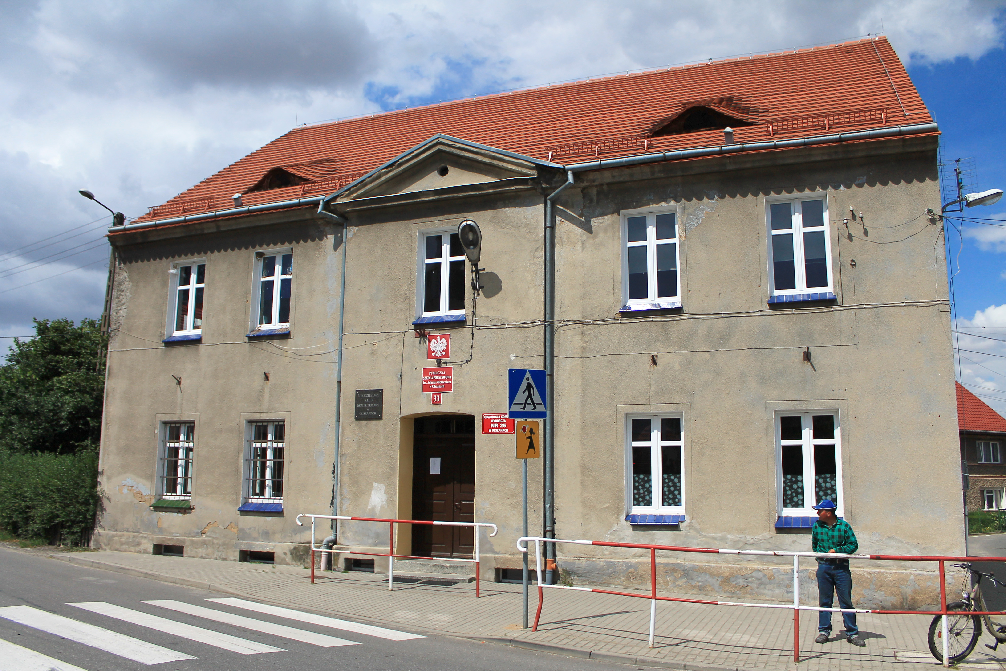 Olszany, gmina Strzegom. Szkoła podstawowa im. Adama Mickiewicza oraz obwodowa komisja wyborcza nr 25.